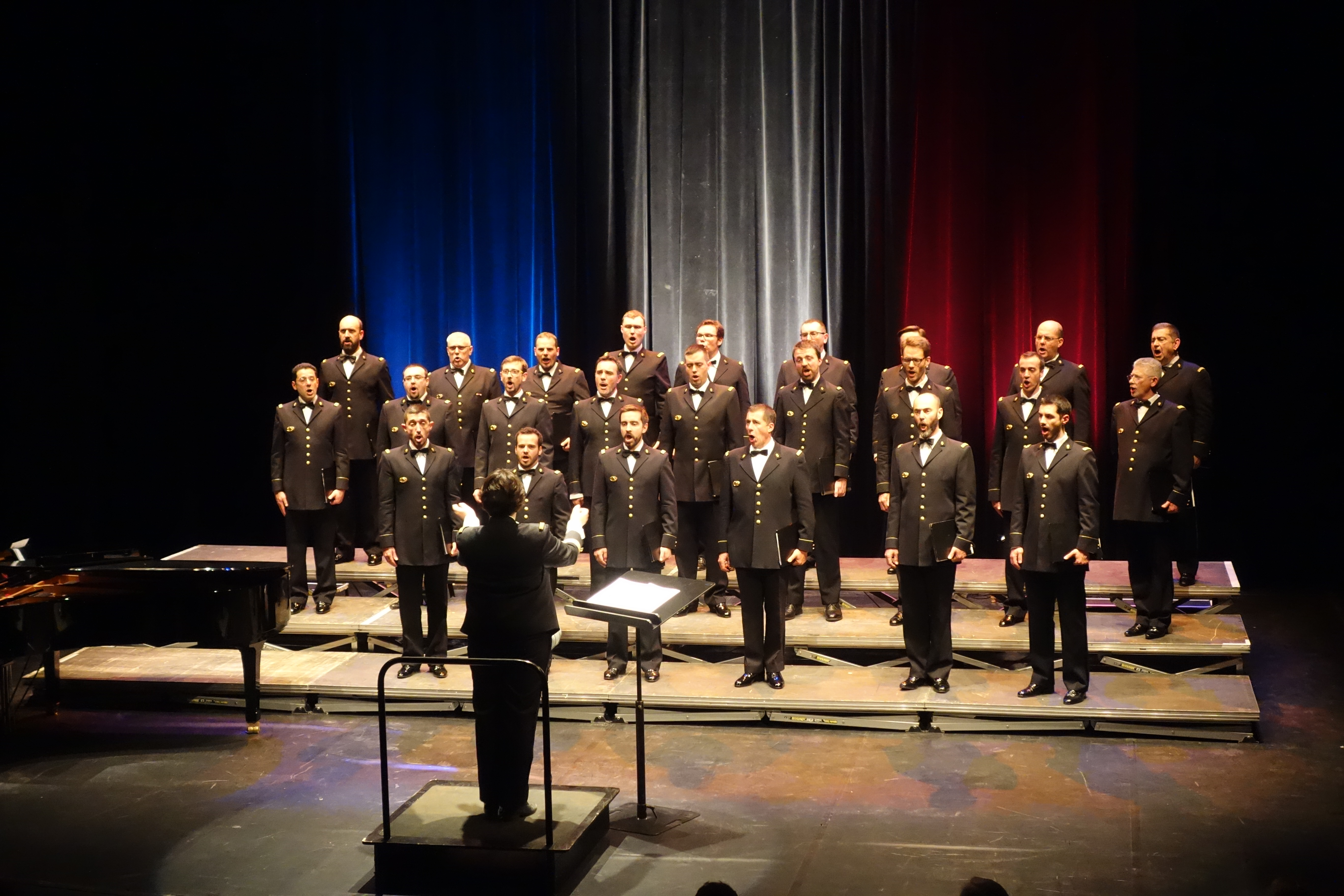 Concert du Chœur de l'Armée française au théâtre de Lons-le-Saunier dans le cadre de l'Année de La Marseillaise